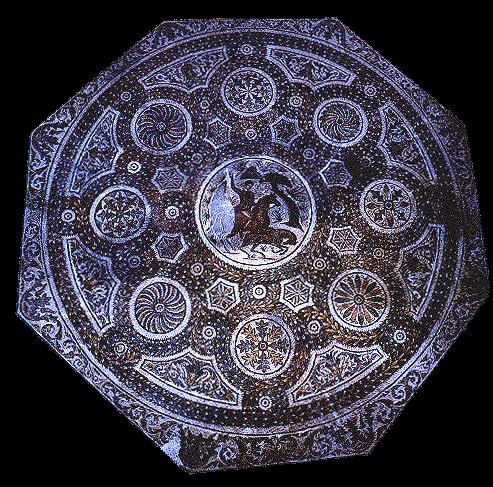 Mosaico de la Villa del Ramalete (s. IV), en el Museo de Navarra